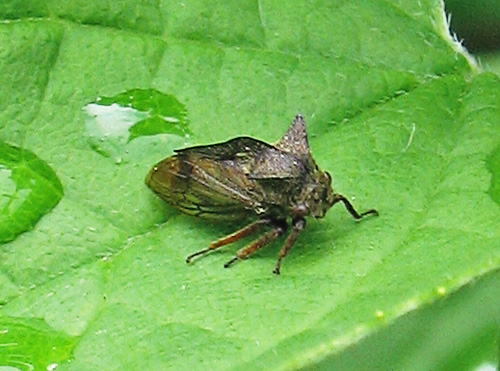 Beschreibung: Dornzikade (Centrotus cornutus) Fotograf: Darkone, 3. Juni 2005